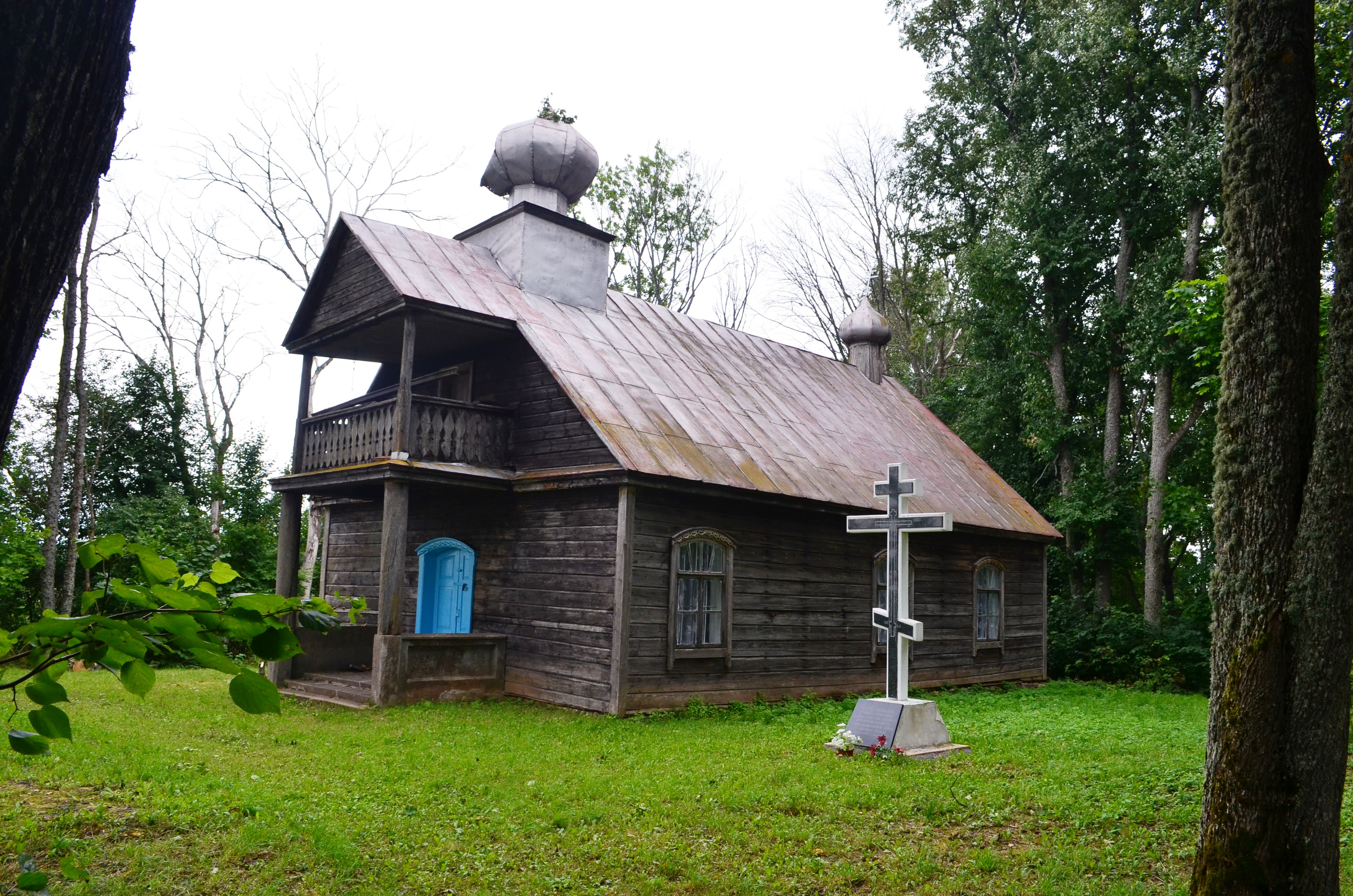 Bobriškio sentikių cerkvė, Rokiškio r.